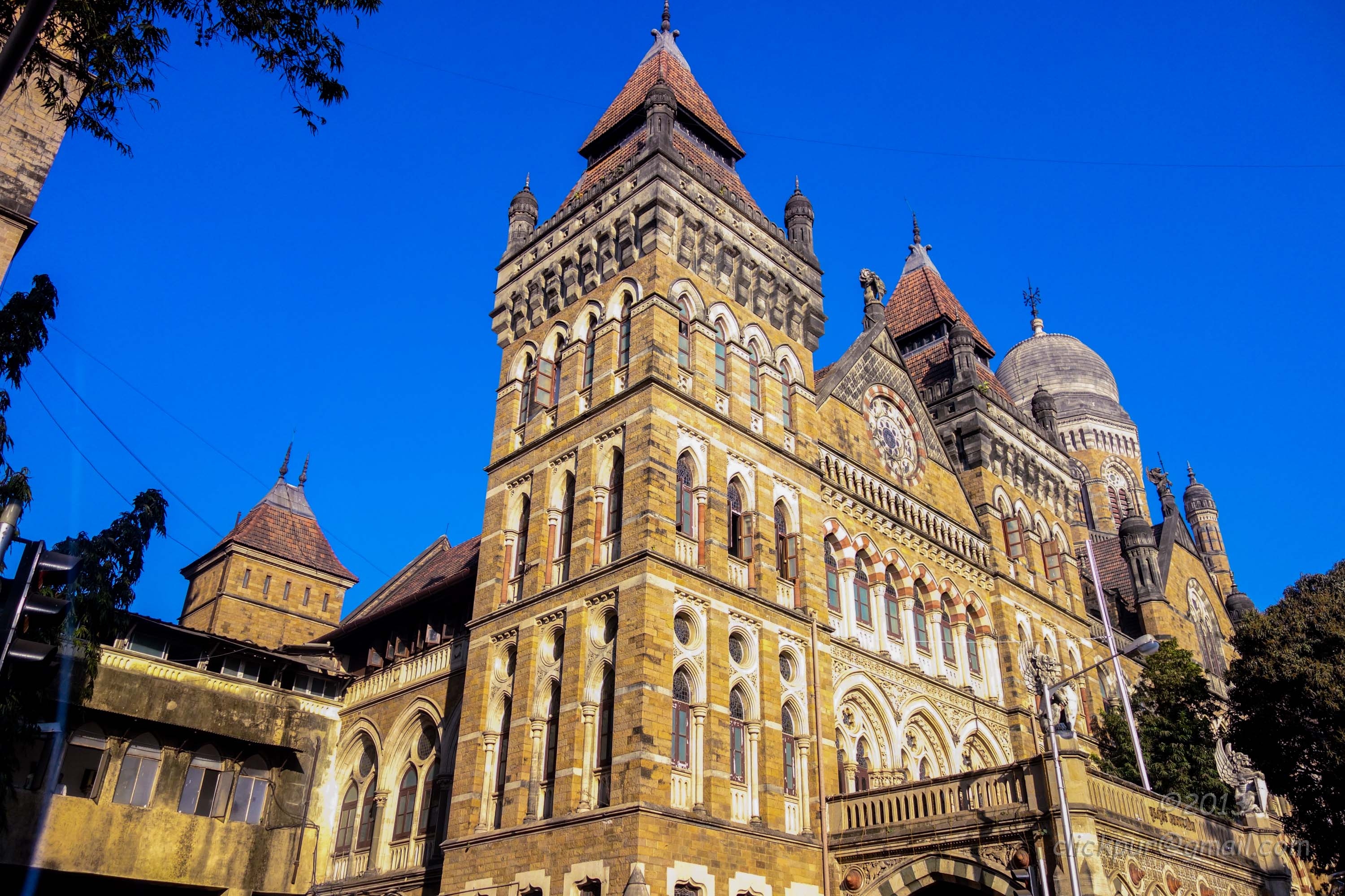 KalaGhoda, Fort,Mumbai